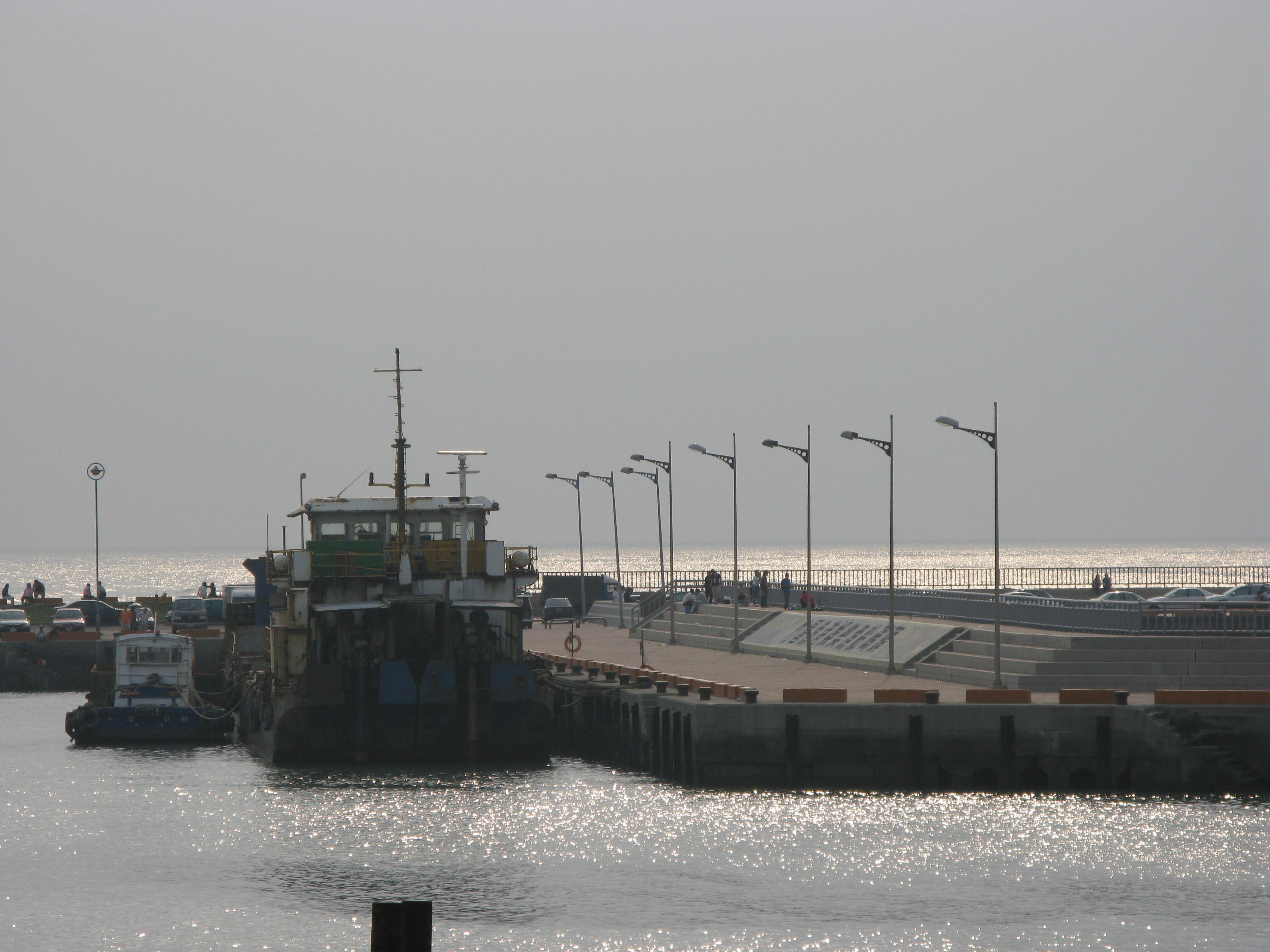 桃園縣大園鄉竹圍漁港碼頭。